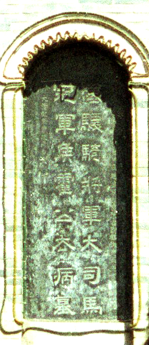 西安霍去病墓